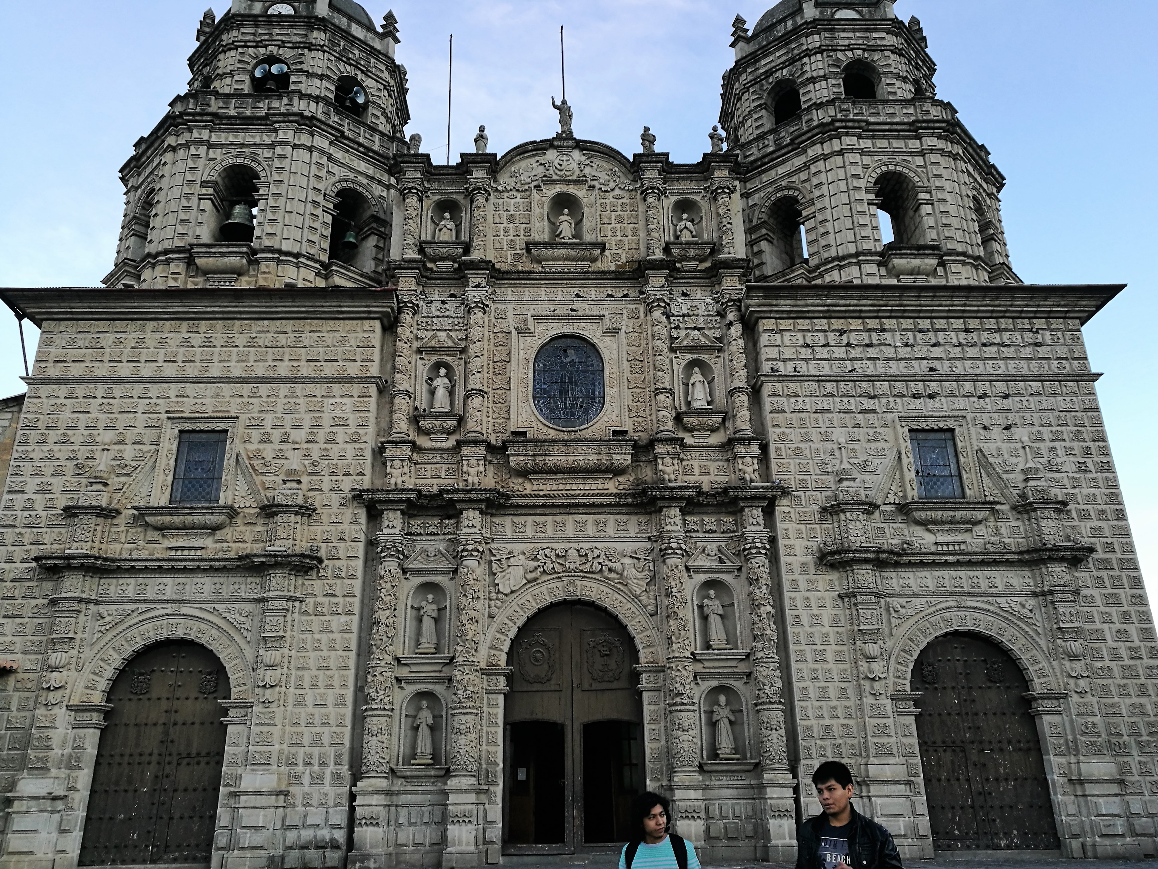 Façana principal de San Francisco de Asís de Cajamarca03